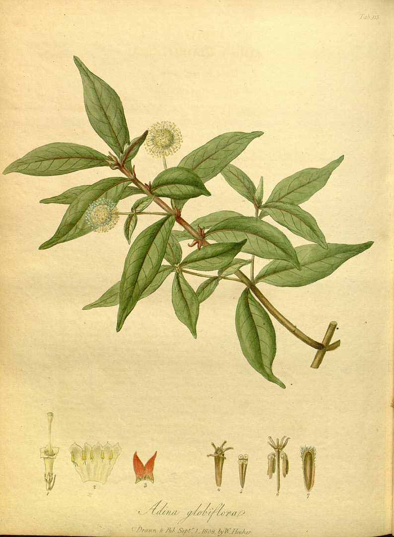 Adina pilulifera у книзі The paradisus Londinensis, t. 115 (1805) [W. Hooker]